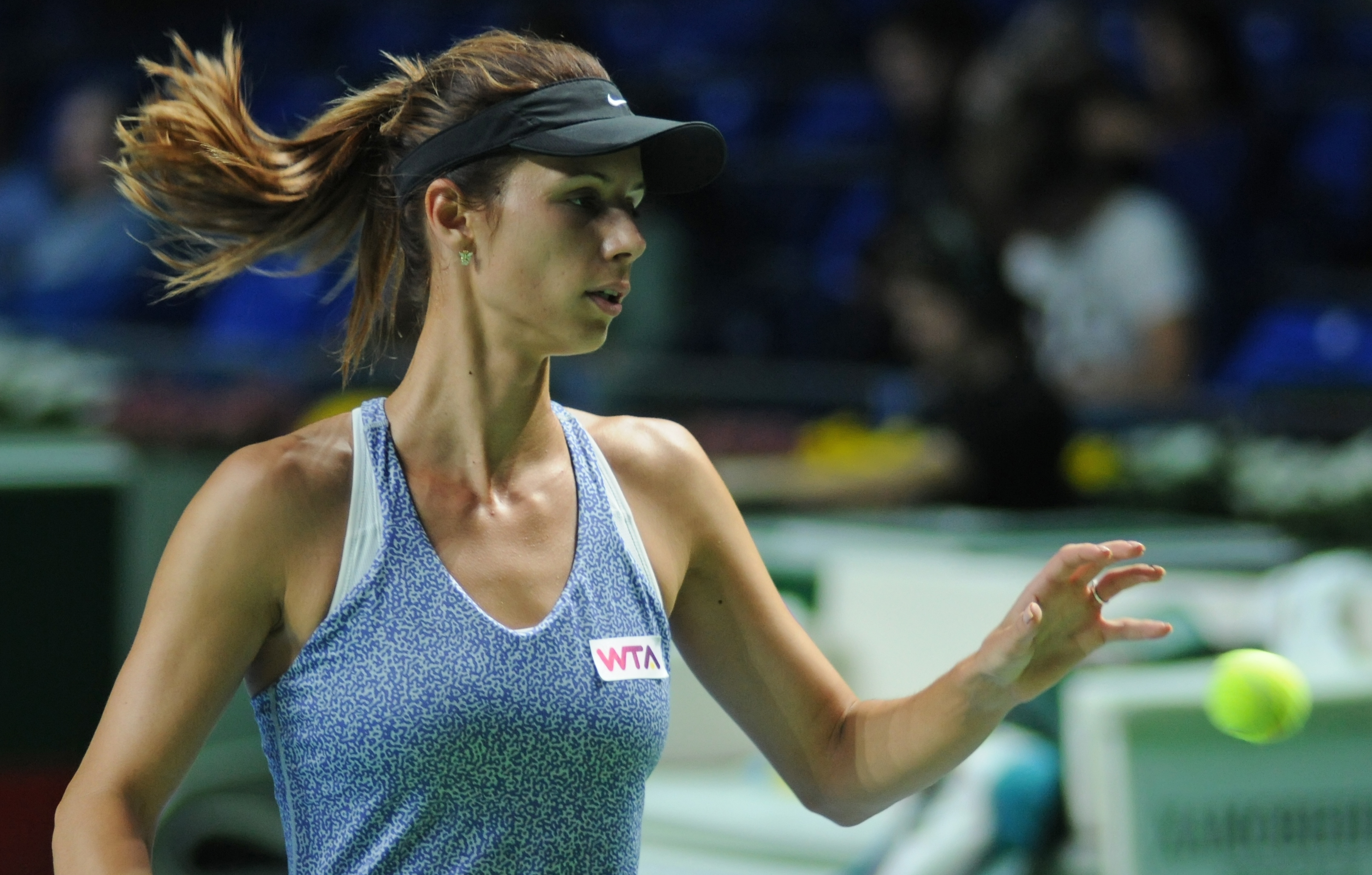 Tsvetana Pironkova at the 2014 Kremlin Cup